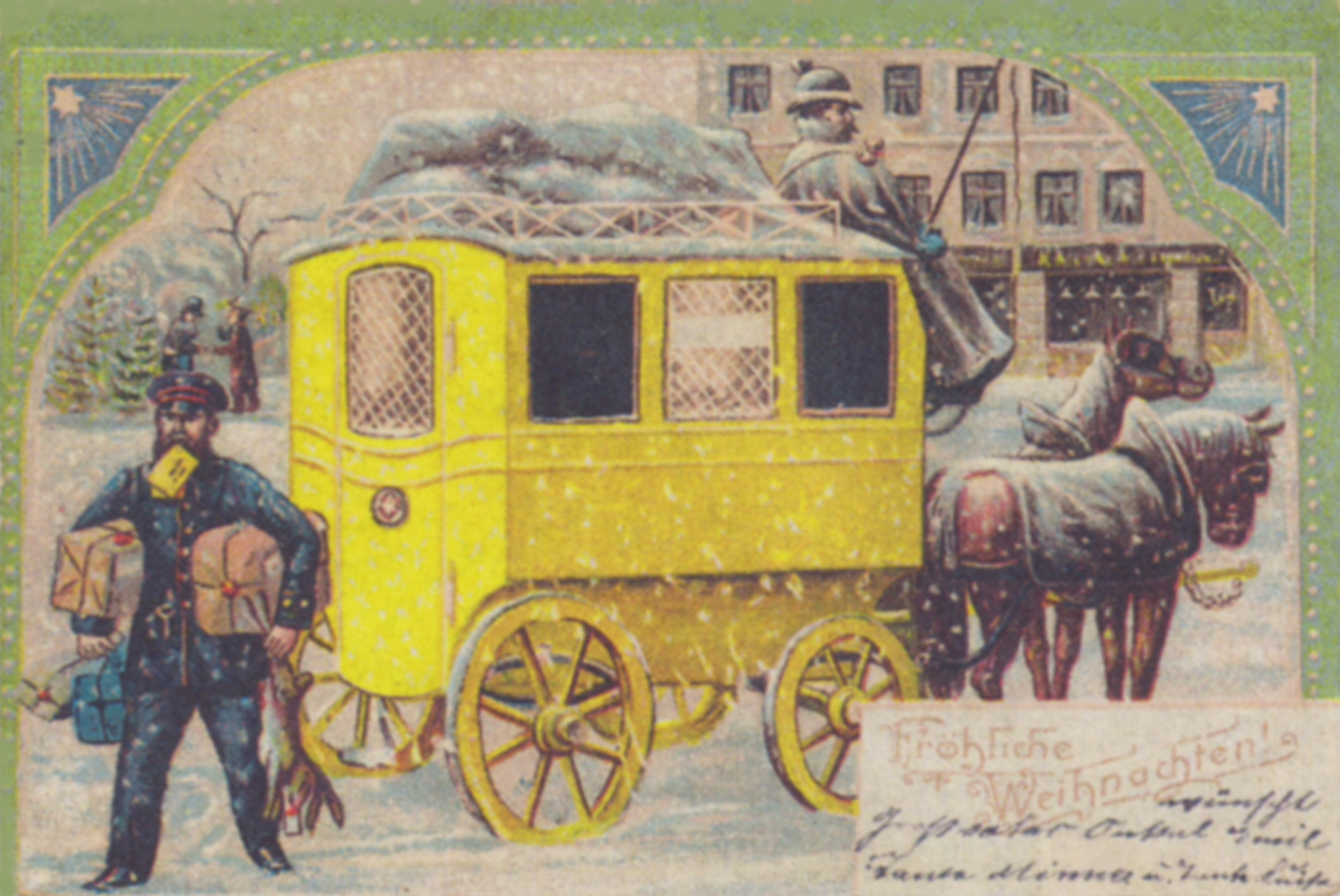 Weihnachtspostkarte aus Deutschland aus dem Jahr 1904